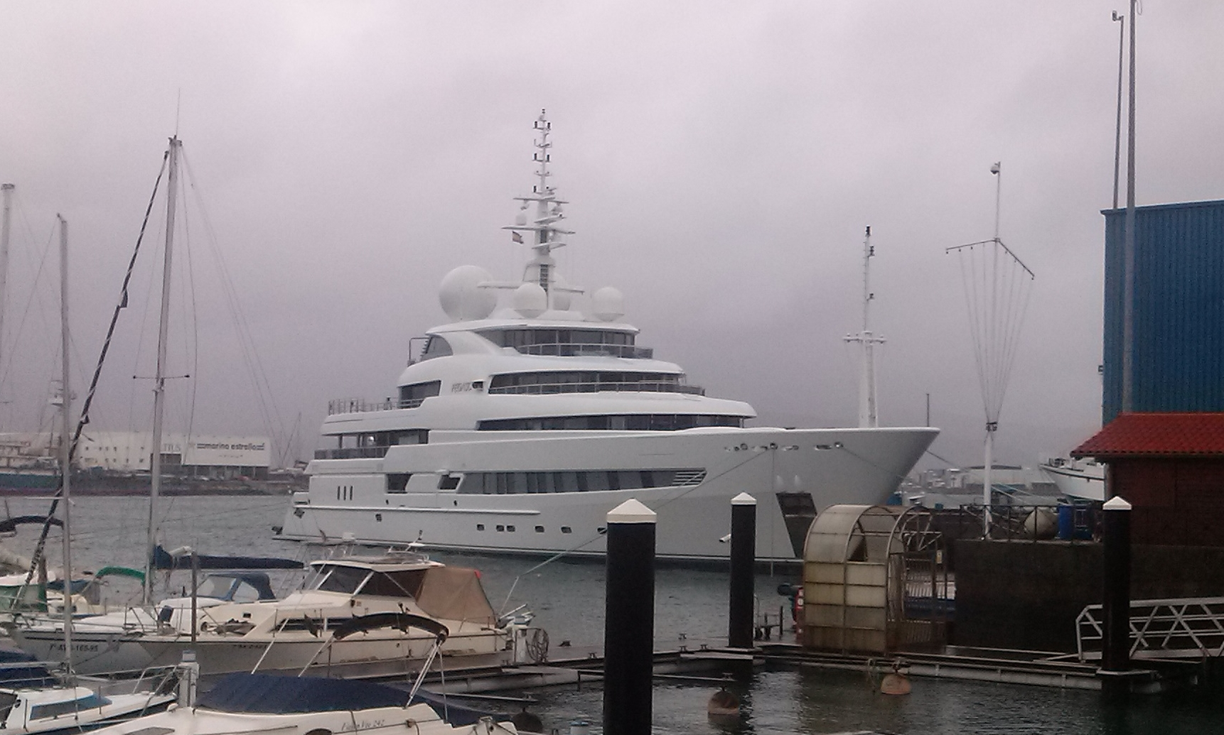 Yate en Bouzas en 2014